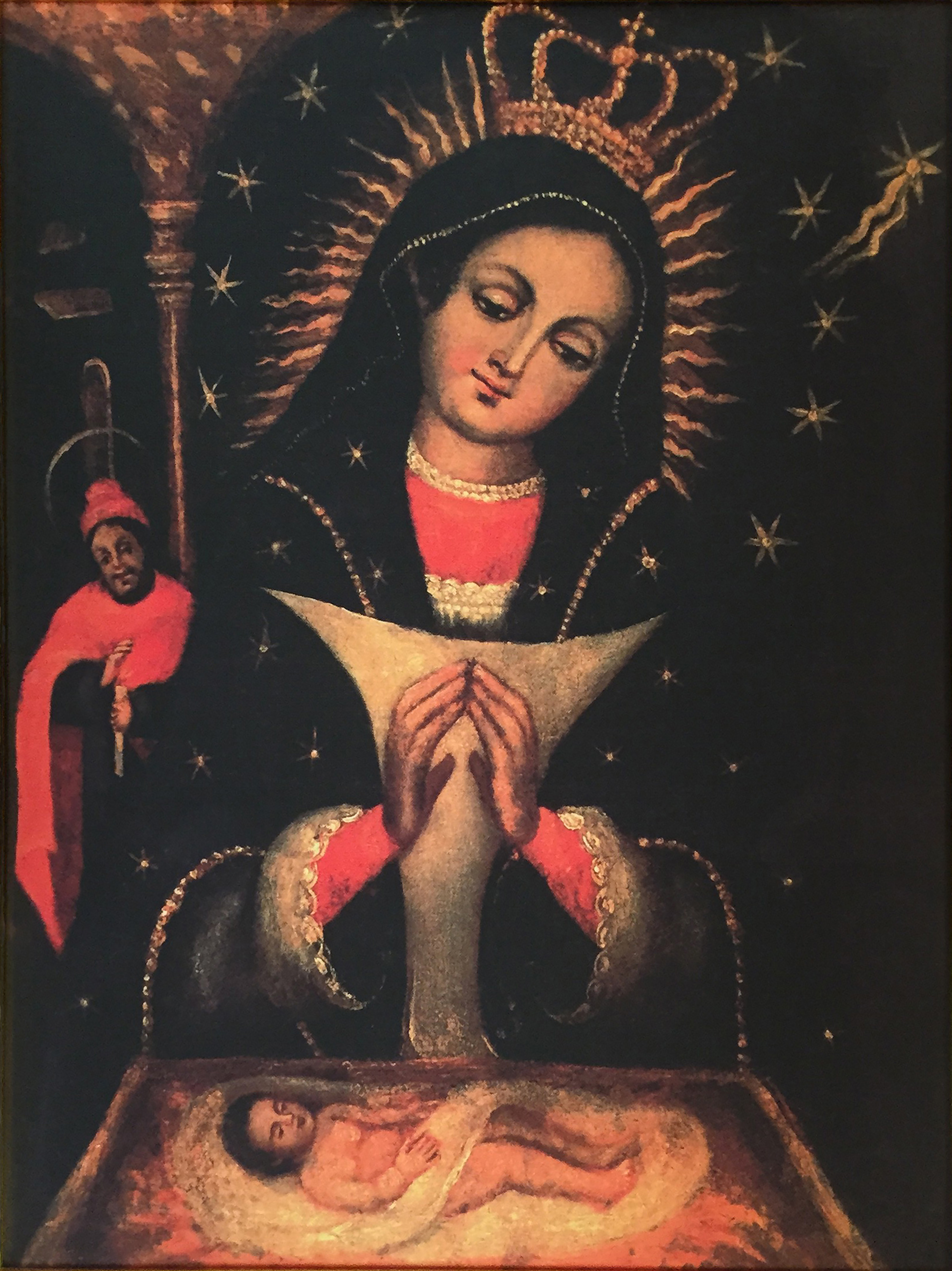 Imagen oficial de Nuestra Señora de la Altagracia.